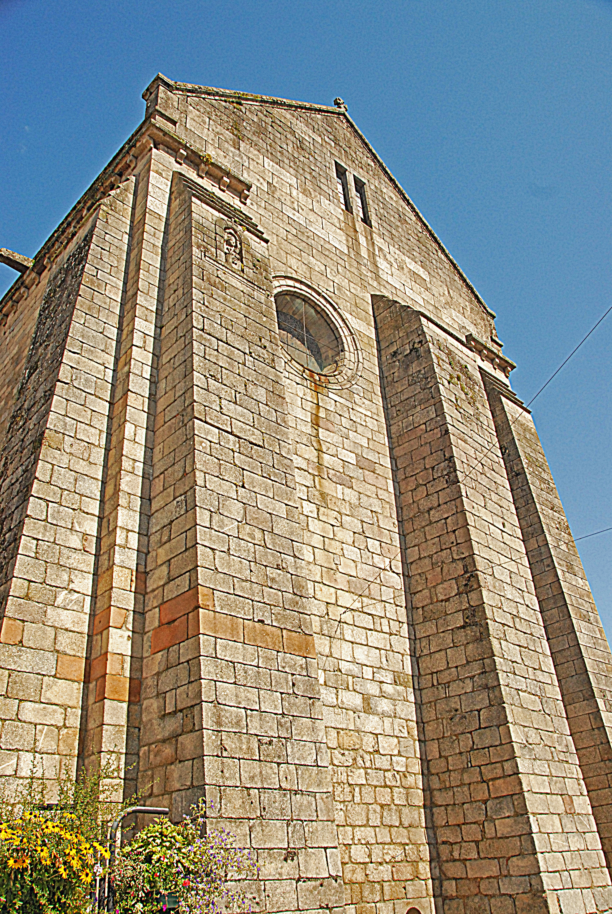 N.-D. de La Souterraine, südl. Querhausgiebelwand